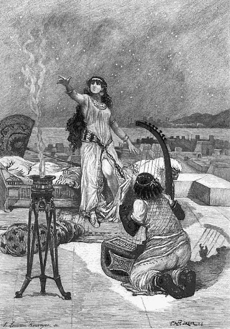 Salammbô, Gustave Flaubert - O Tanit ! tu m'aimes, n'est-ce pas?